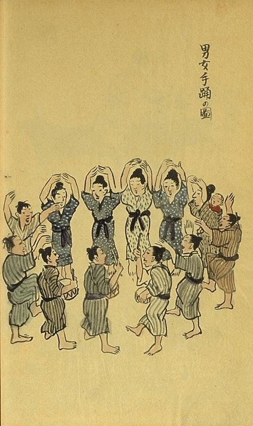 《德之島事情》插圖